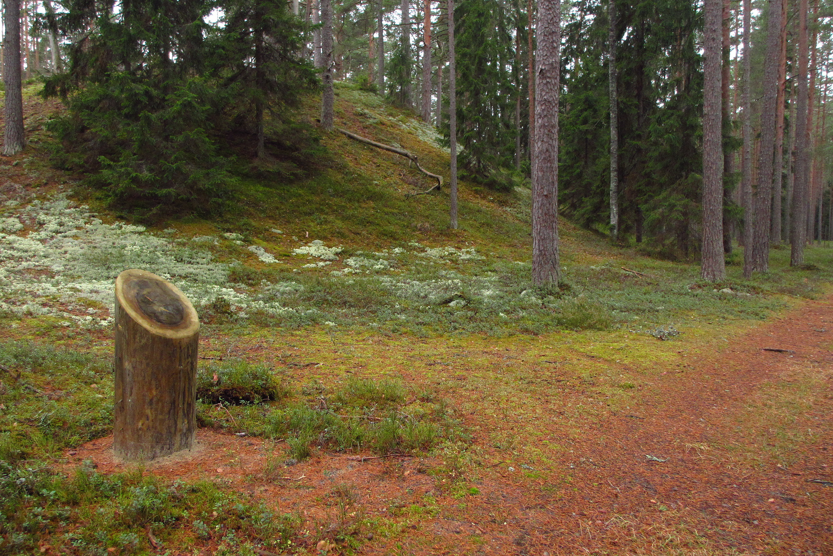 Taimestunud luide Kolga looduskaitsealal